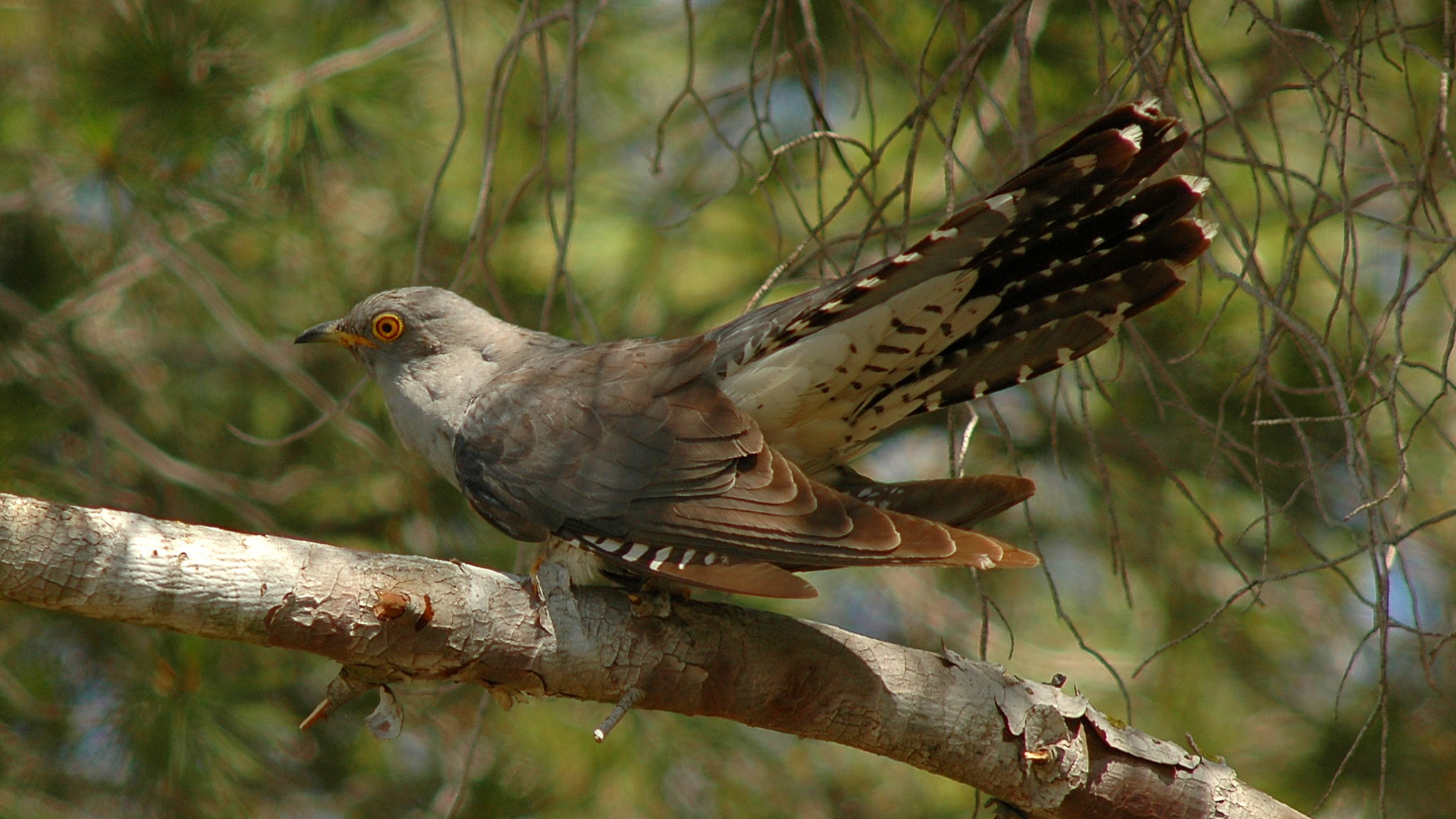 Cuculus canorus